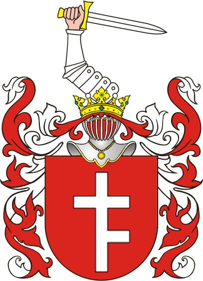 Clan Prus